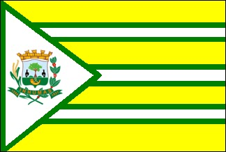 Bandeira do município de Inhumas, Goiás.